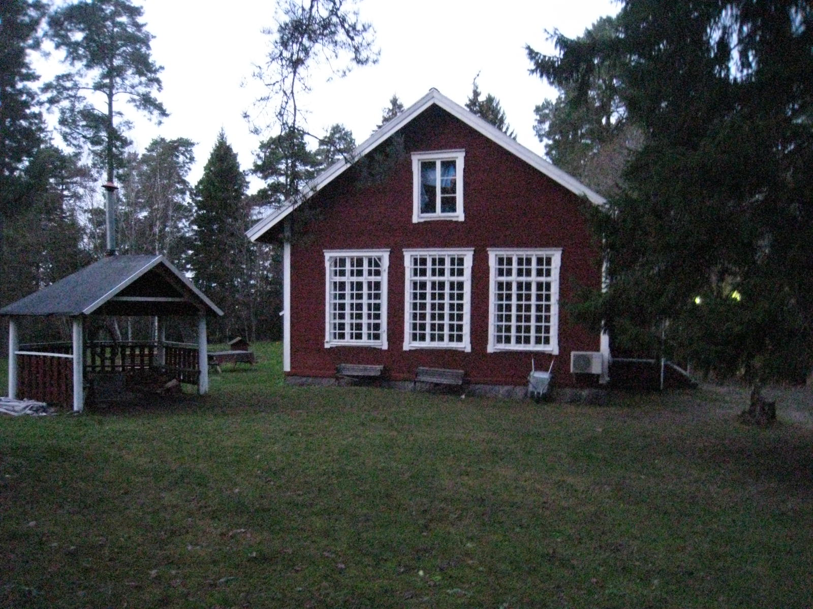 Görvälns skola i Järfälla, Stockholms län, byggdes 1896. Foto en sen eftermiddag i november 2014.